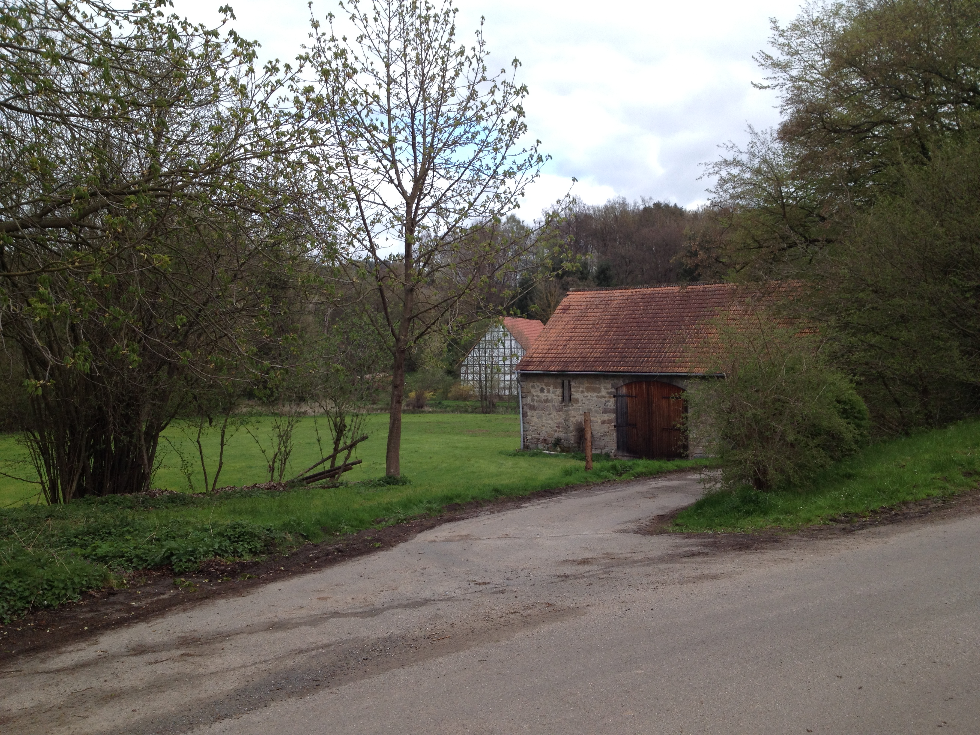 Der Eco Pfad Kulturgeschichte Wolfhagen wenige Meter östlich der Station Papiermühle Schützeberger Hof, die westlich der kleinen Brücke, an welcher auch die Bushaltestelle Schützenhaus/Fischteiche steht, zu finden ist